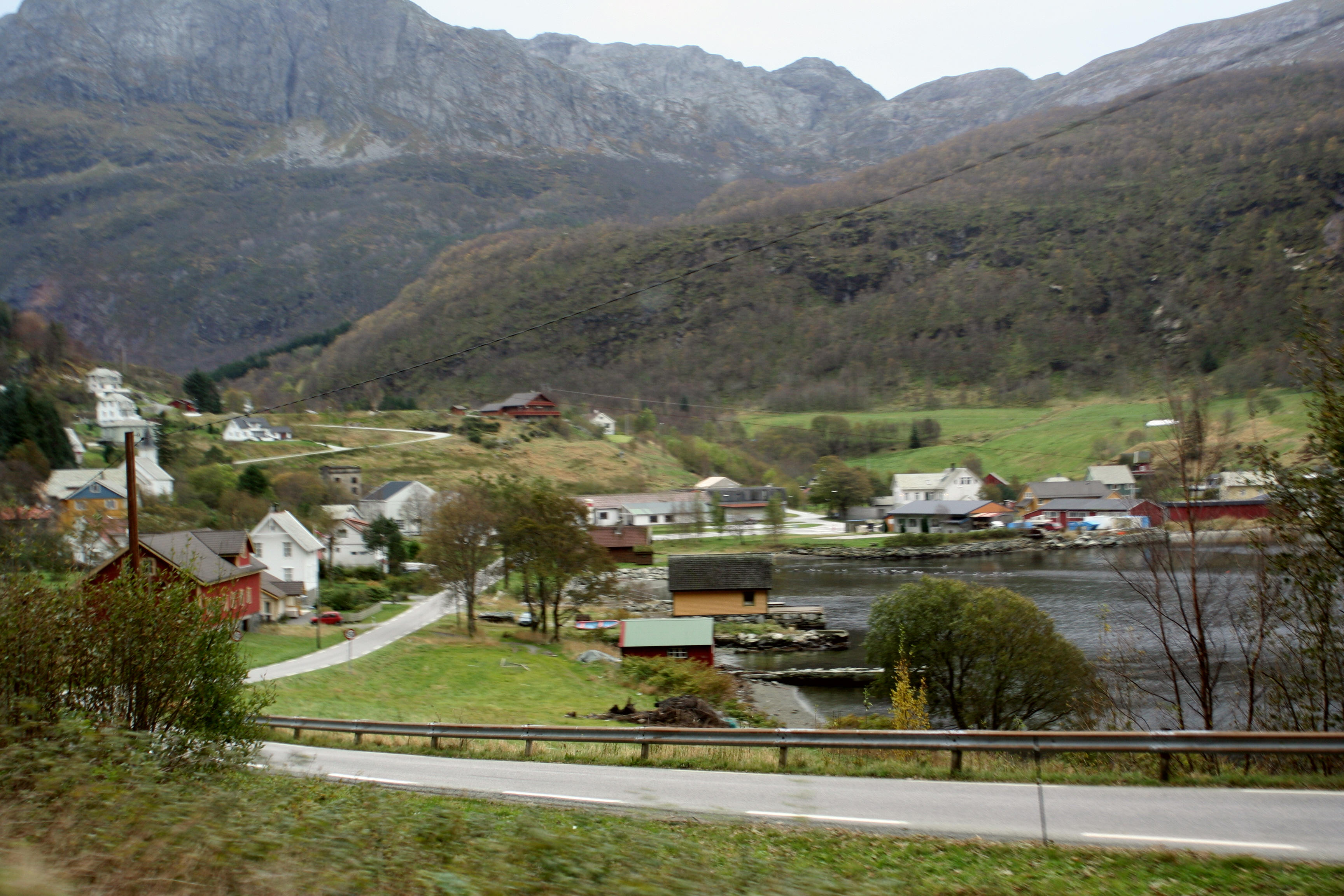 Bygda Stongfjorden i Askvoll kommune i Sogn og Fjordane fylke.